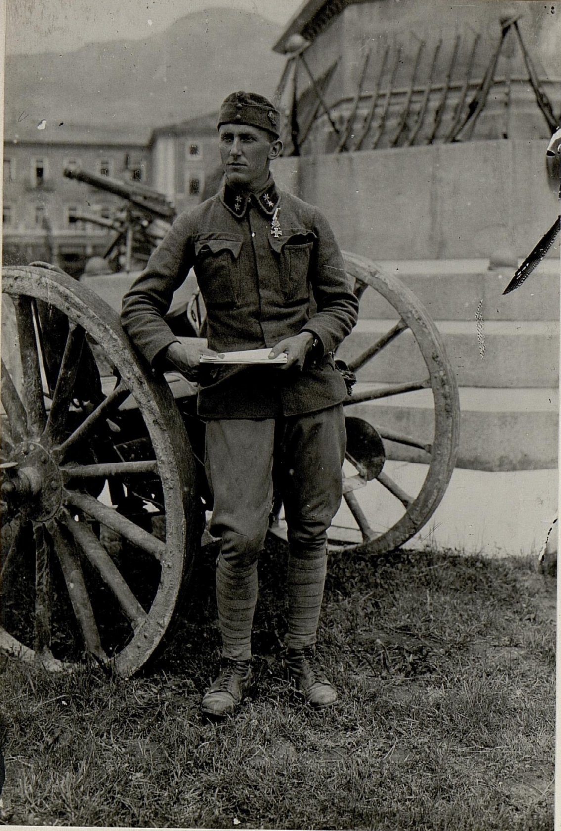 Der Casa Rattiheld, Oblt. MLACKER. Aufgenommen am 2. Juni 1916.